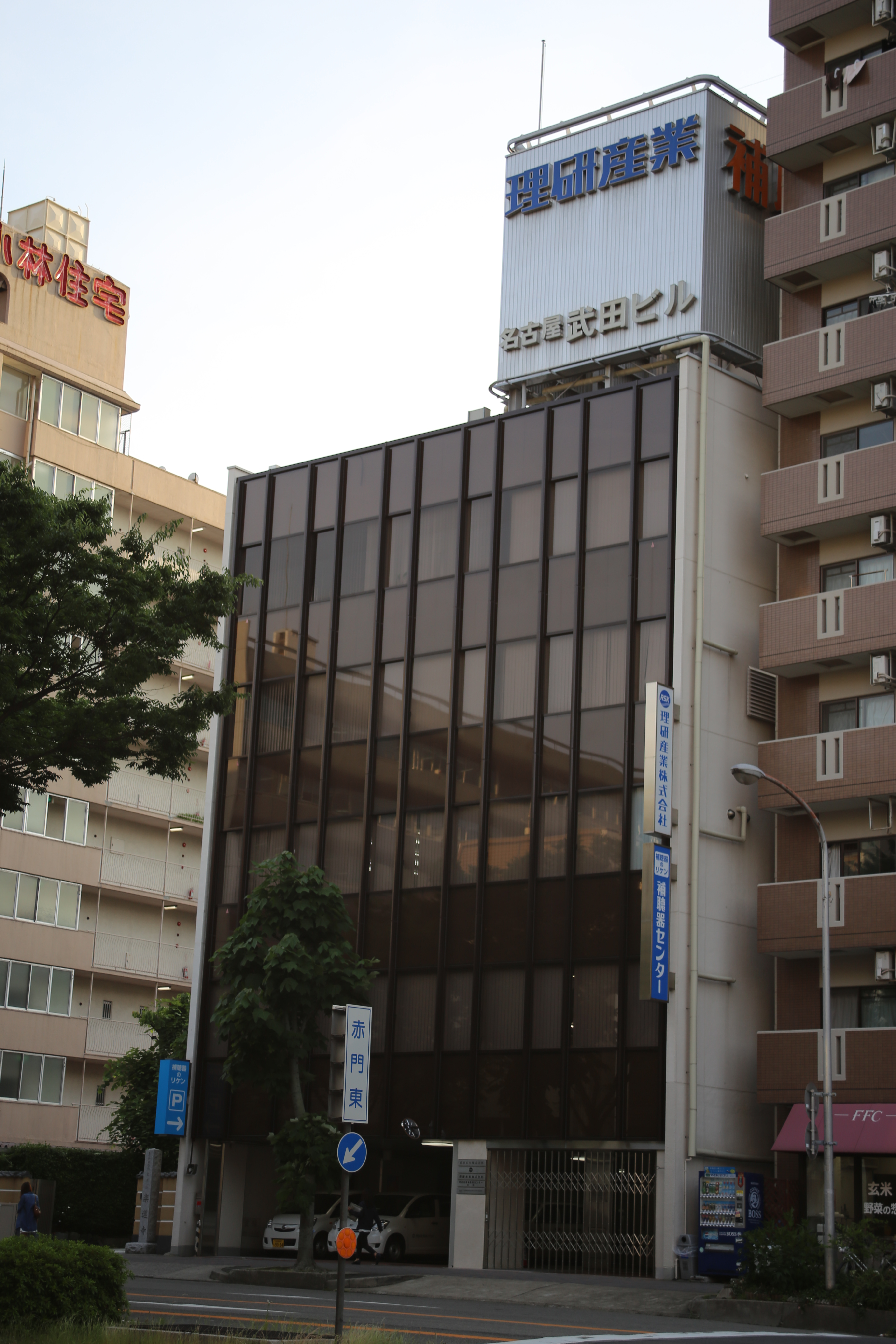 名古屋市中区大須四丁目の理研産業本社を東側公道北側より撮影